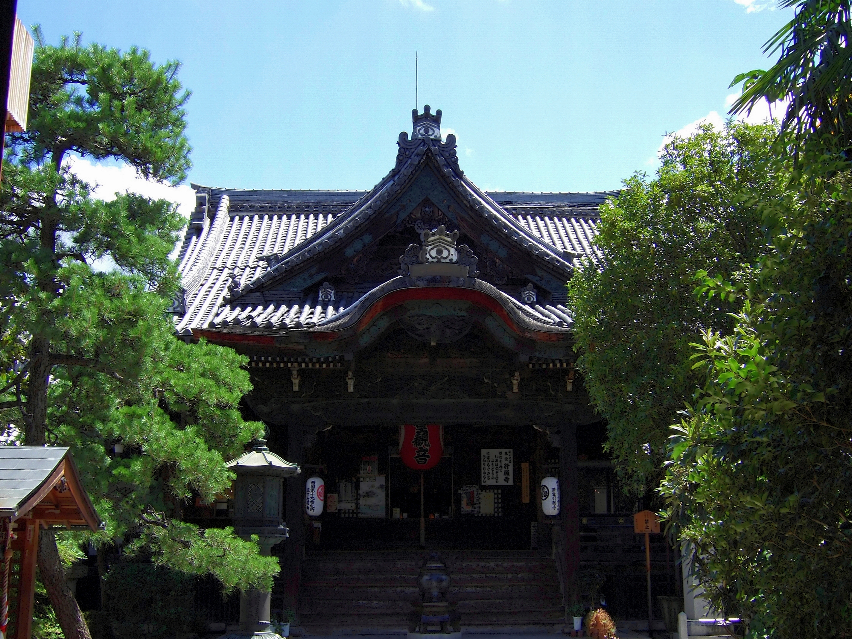 霊ゆう山行願寺革堂